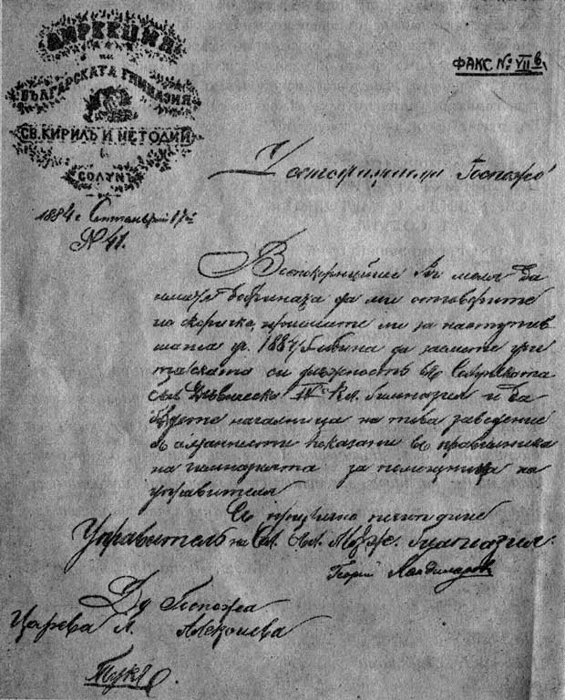 Документ на Солунската българска мъжка гимназия от 1884 година.